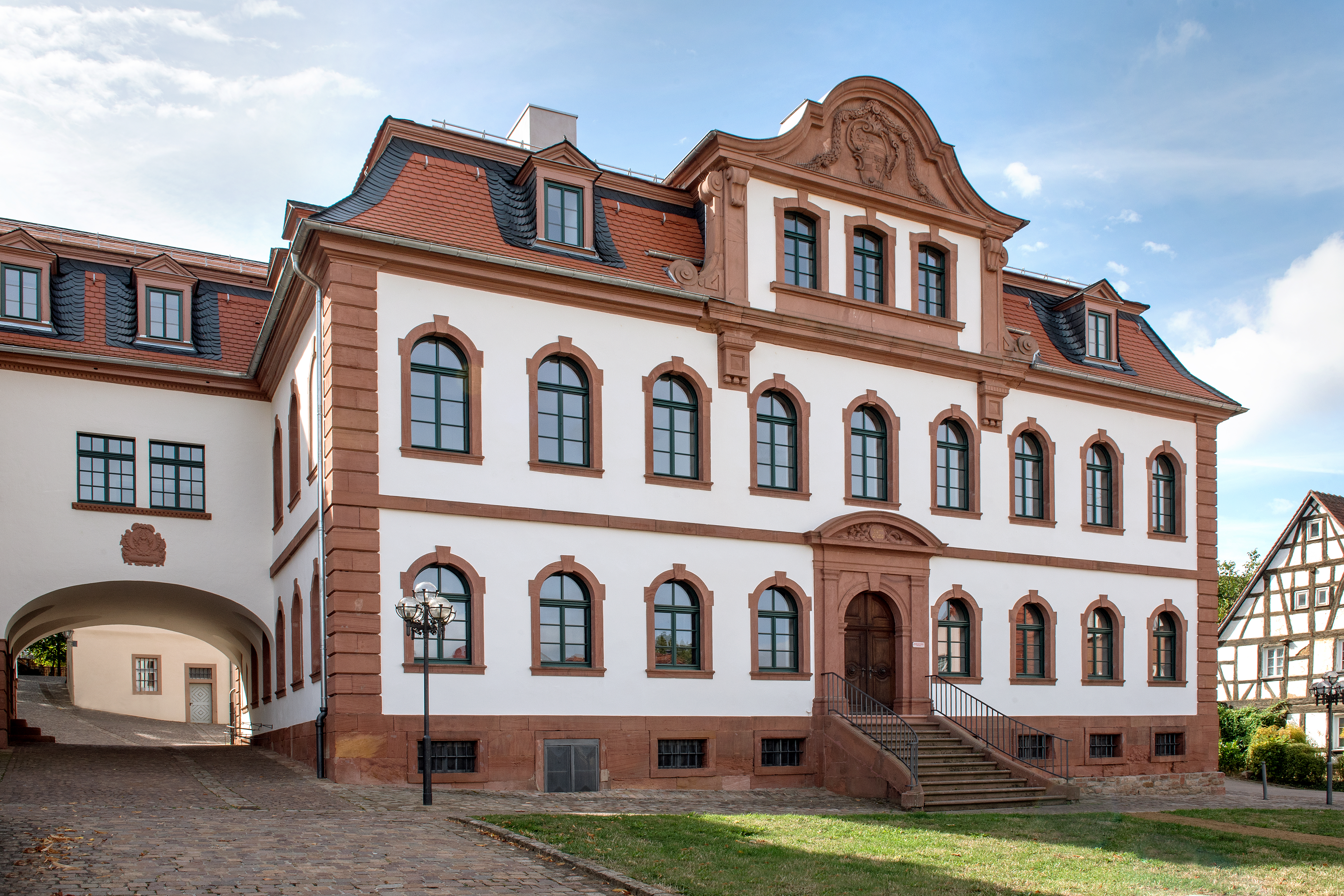 Frontansicht Neues Schloss, nach der Sanierung